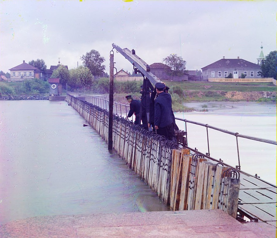 Плотина у с. Ниловицы (Ноловцы) имени императрицы Александры Федоровны.